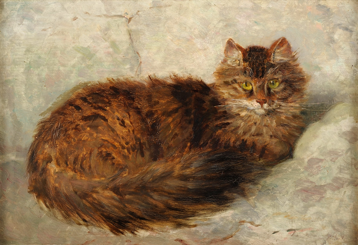 Katze. Monogrammiert. Datiert (18) 97.